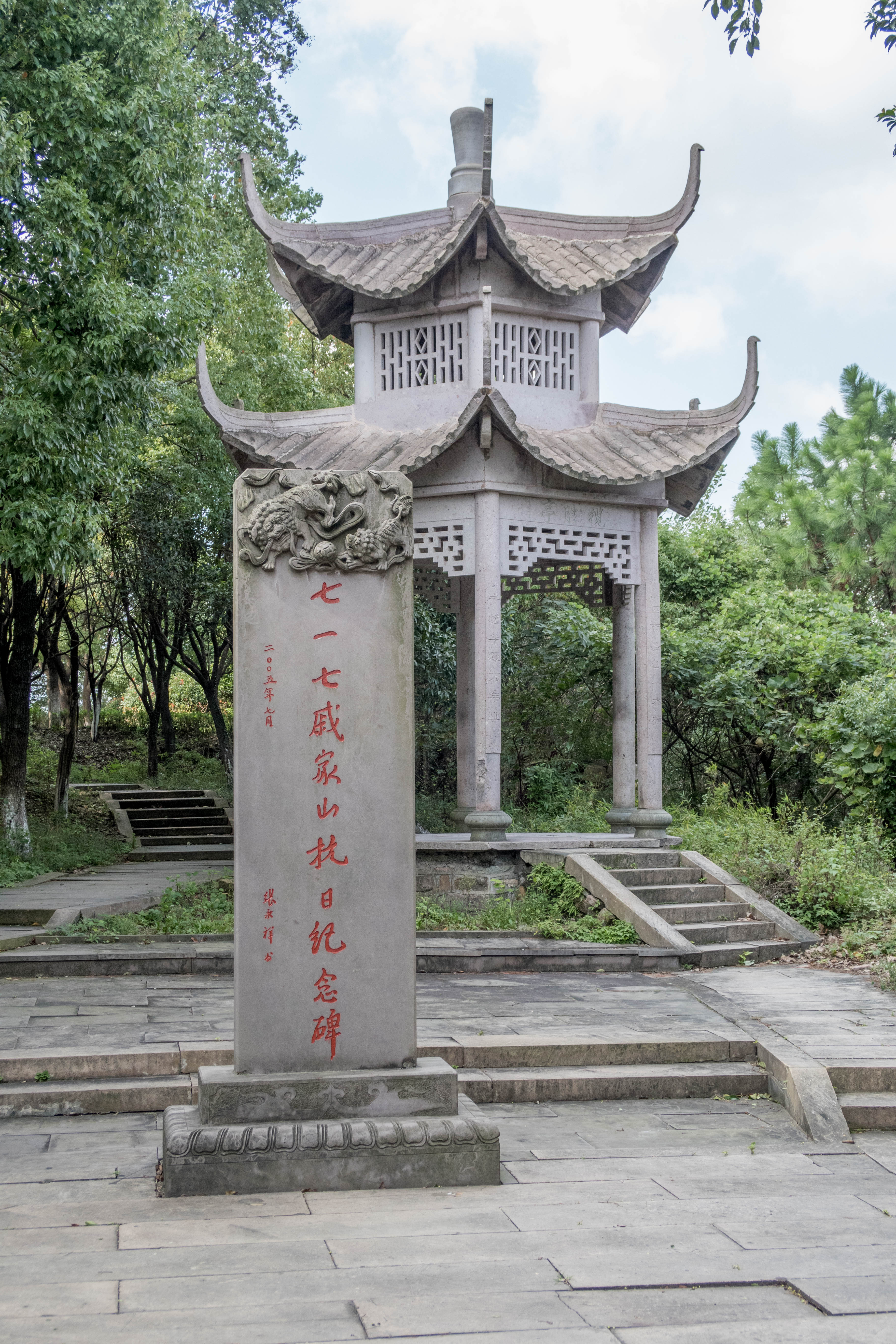 戚家山营垒